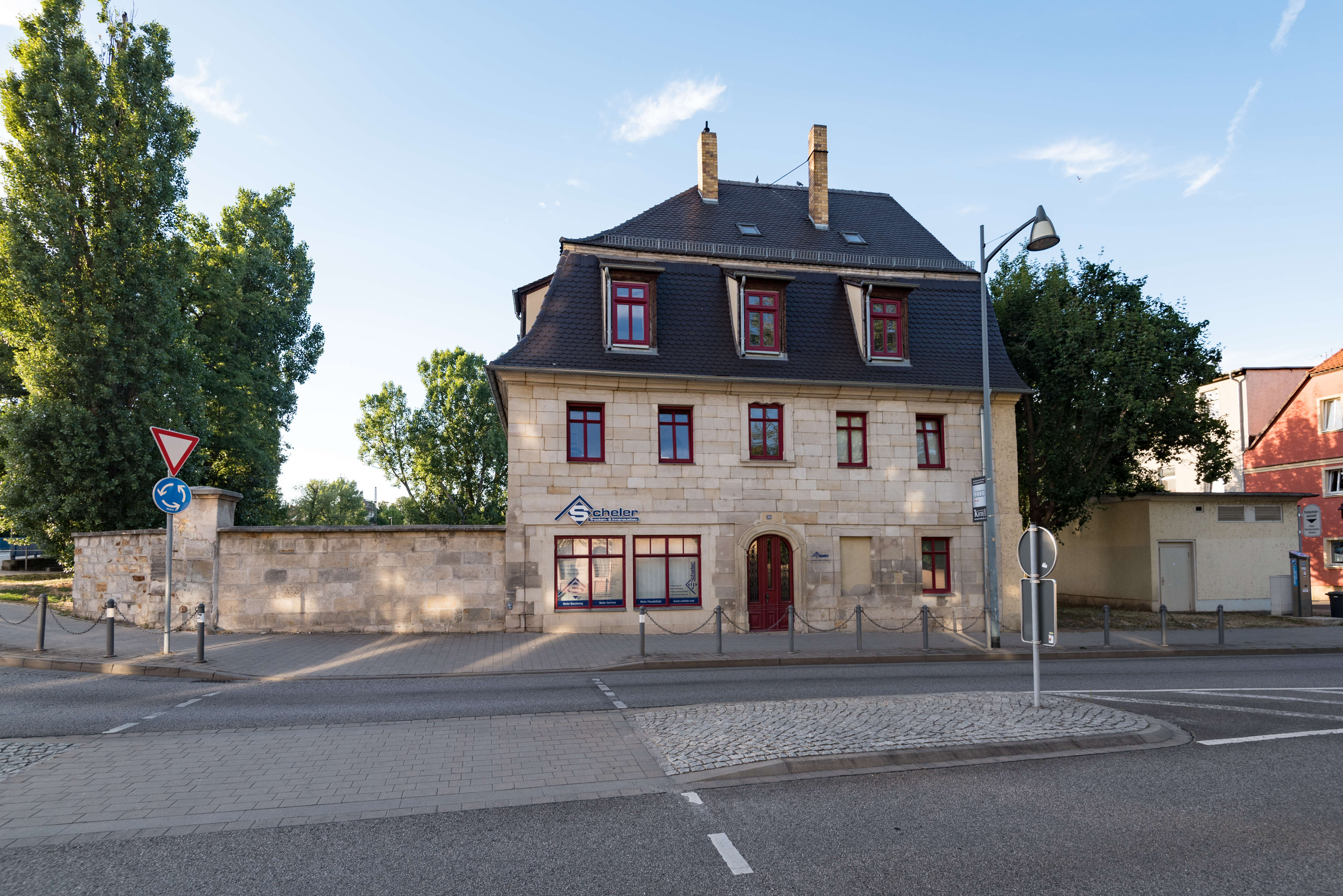 Weißenfels, Dammstraße 39